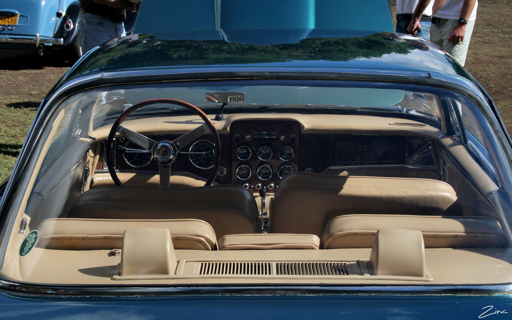 1963 Facel Vega HK II Coupé - int